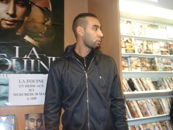 Le rappeur La Fouine au Forum de Besançon (Doubs, France).